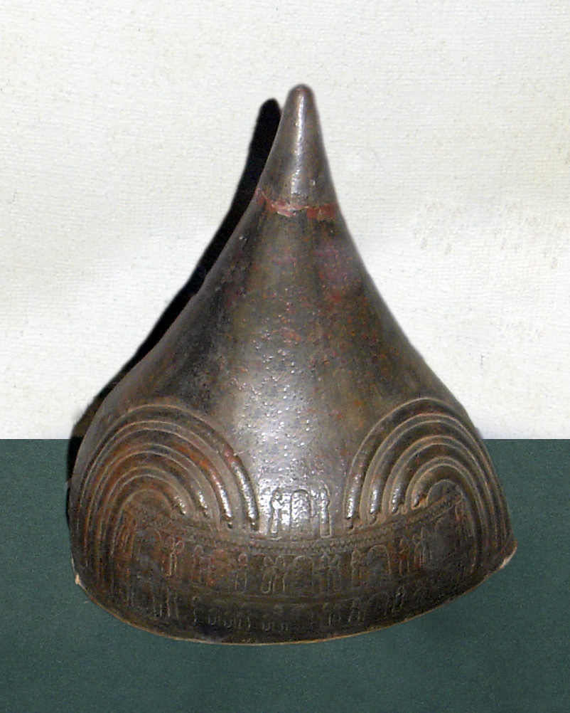 Own work based on image taken by gegman Erebuni museum, Yerevan, Armenia.